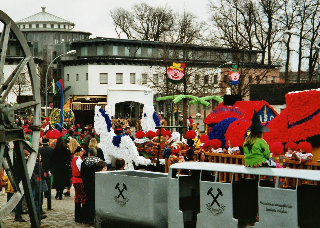 Carneval in Damme 2004